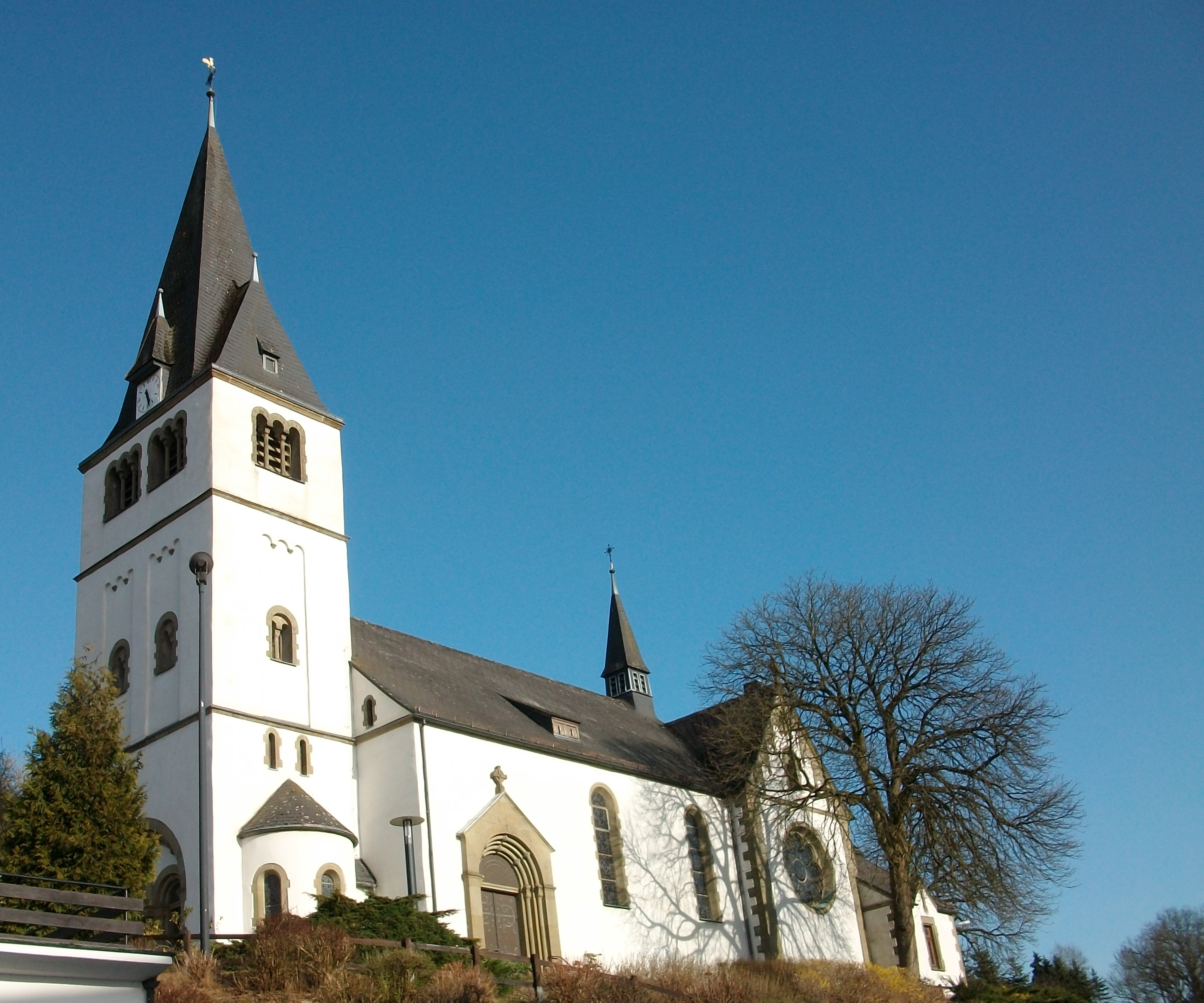 Schmallenberg-Fleckenberg, St.-Antonius-Kirche (Germany)